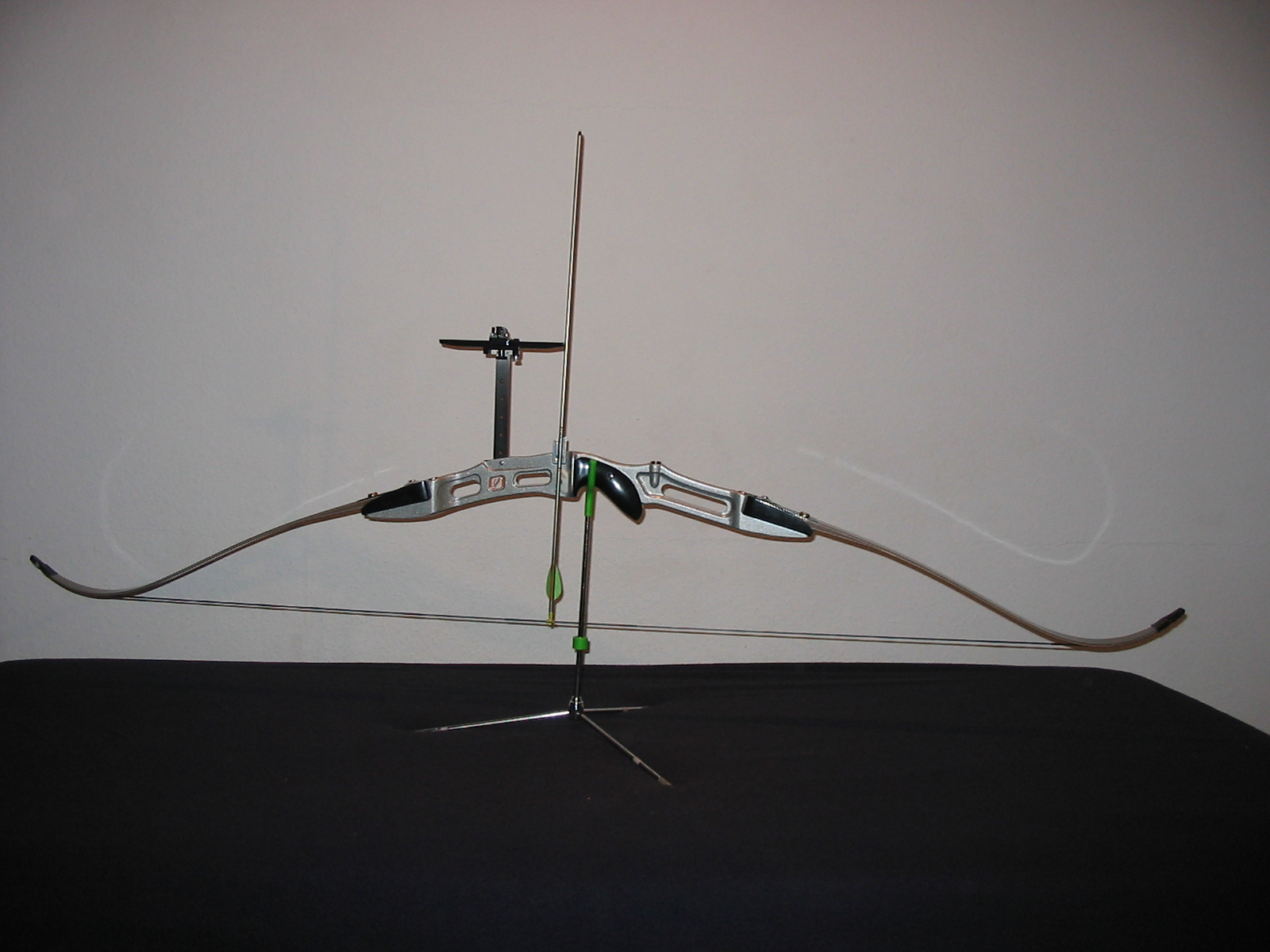 Mein Recurve-Bogen